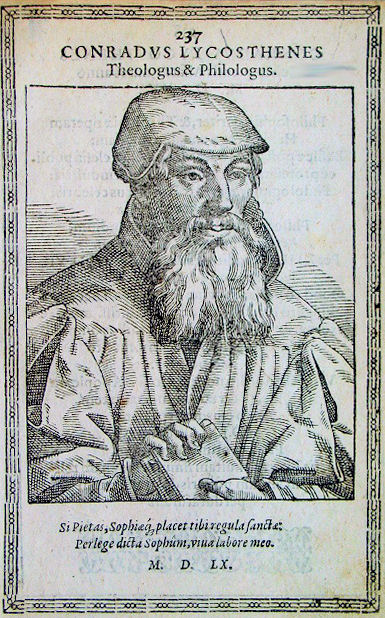 Conrad Lycosthenes (Studium in Heidelberg, 1542-1545 Professor in Basel, ab 1545 Diakon an der St. Leonard Kirche in Basel, Verfasser enzyklopädischer Werke, 1518-1561) Holzschnitt